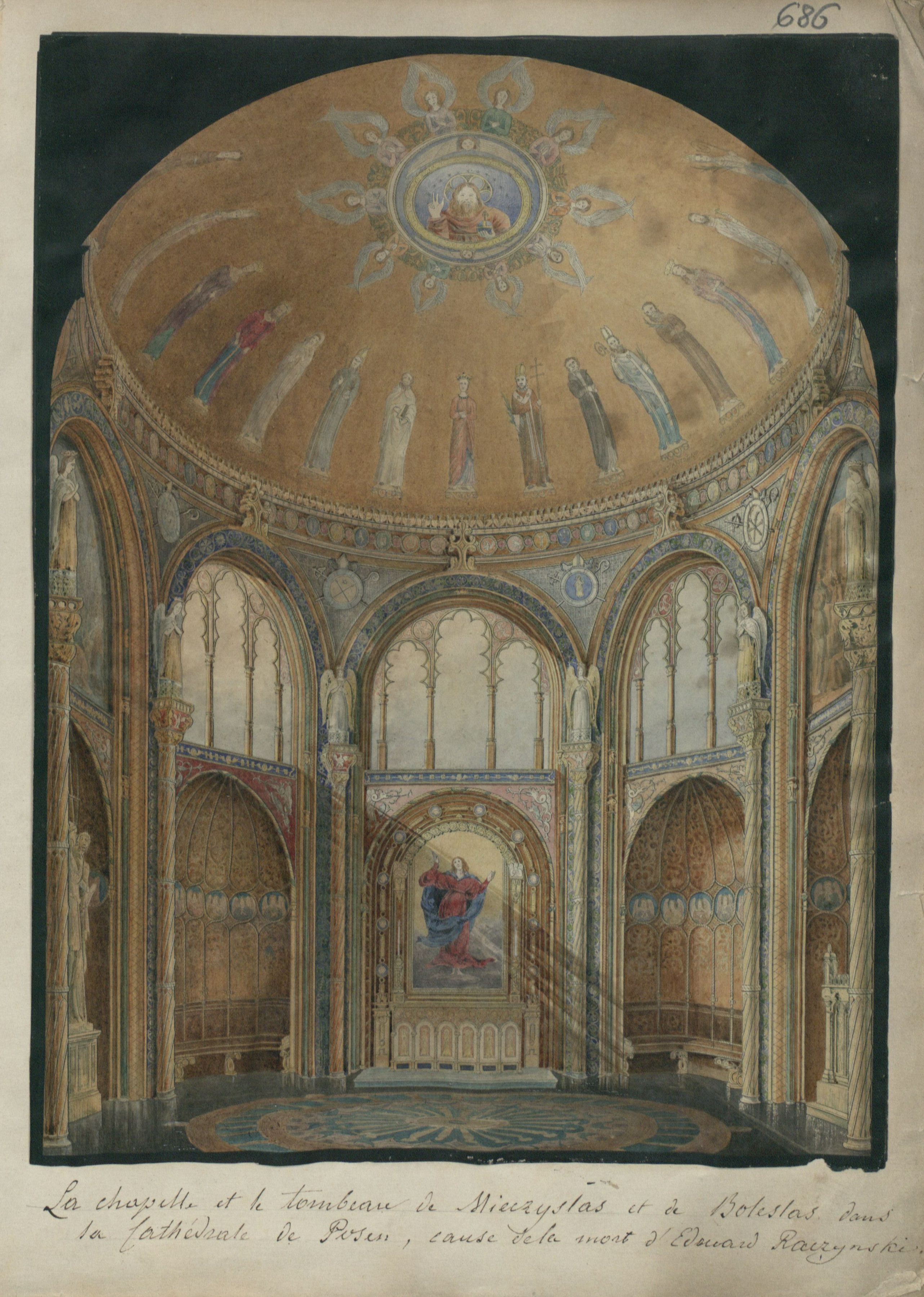 rysunek